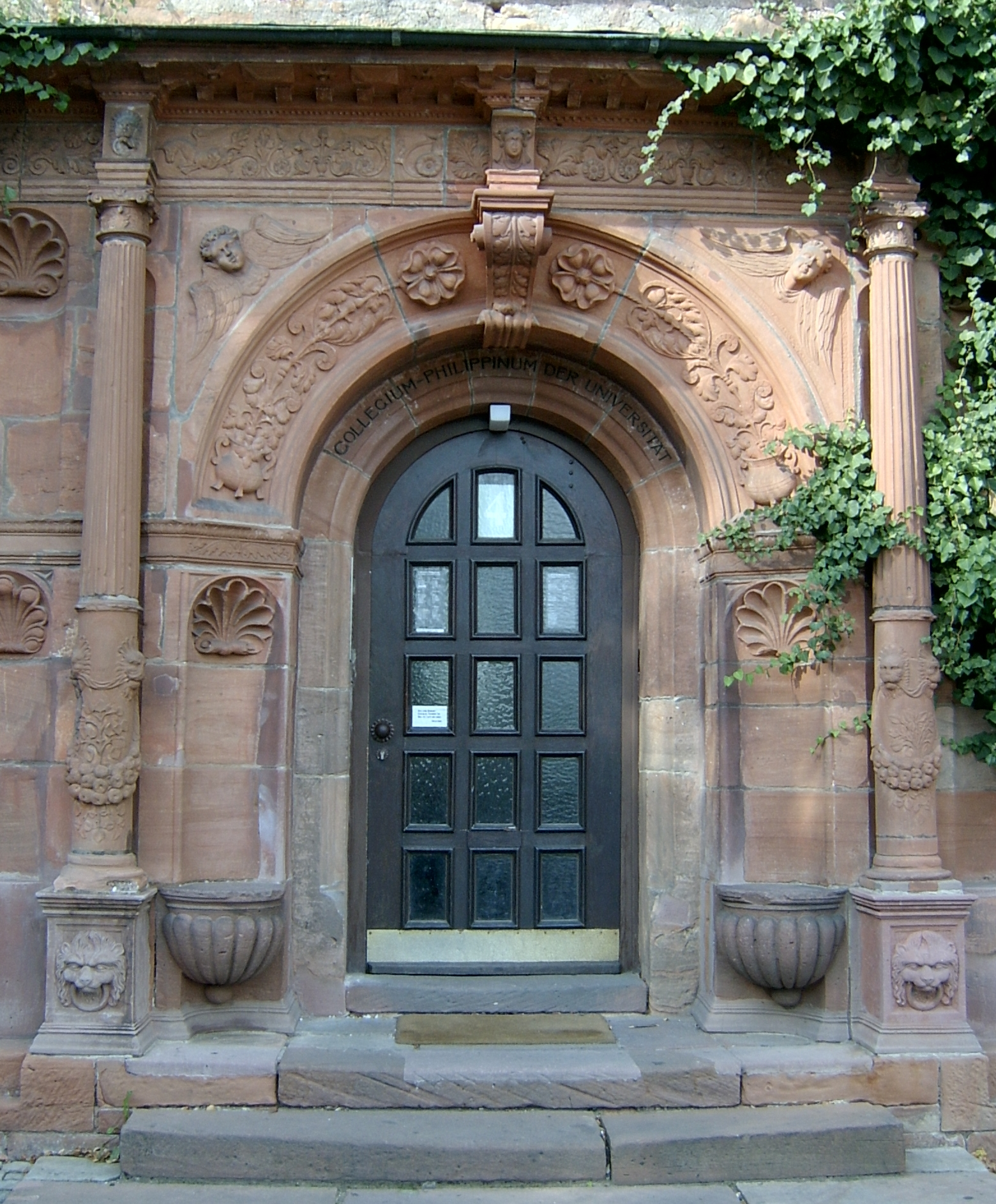 Eingang zum Collegium-Philippinum der Universität in Marburg photographer: Sicherlich date: august 2005